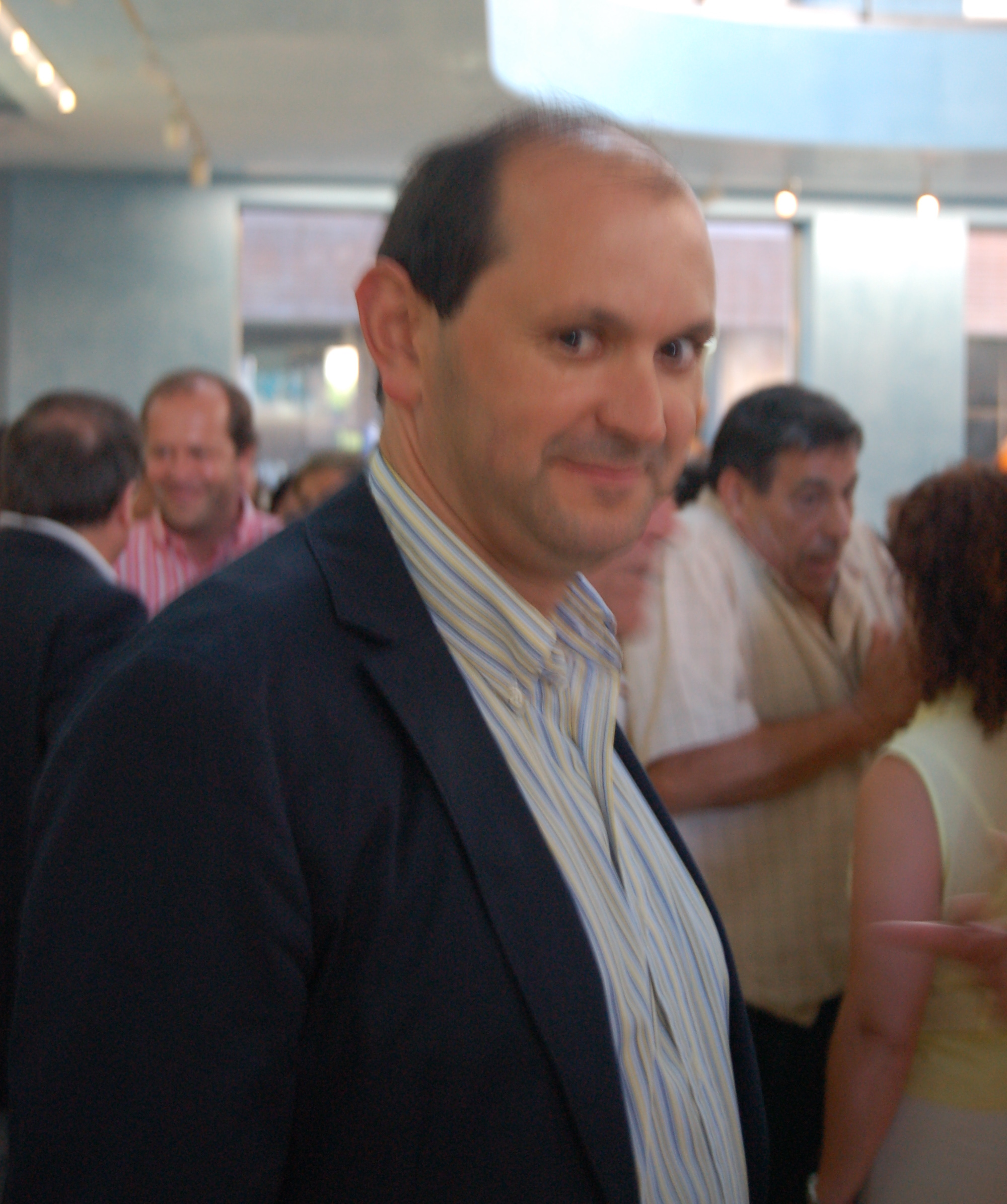 Rafael Louzán Abal na sede de Caixanova de Pontevedra